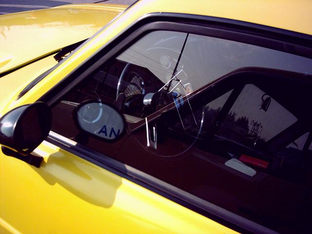 Türkiye'de seri olarak üretilen ilk otomobil markası Anadol'dan bir görünüm.